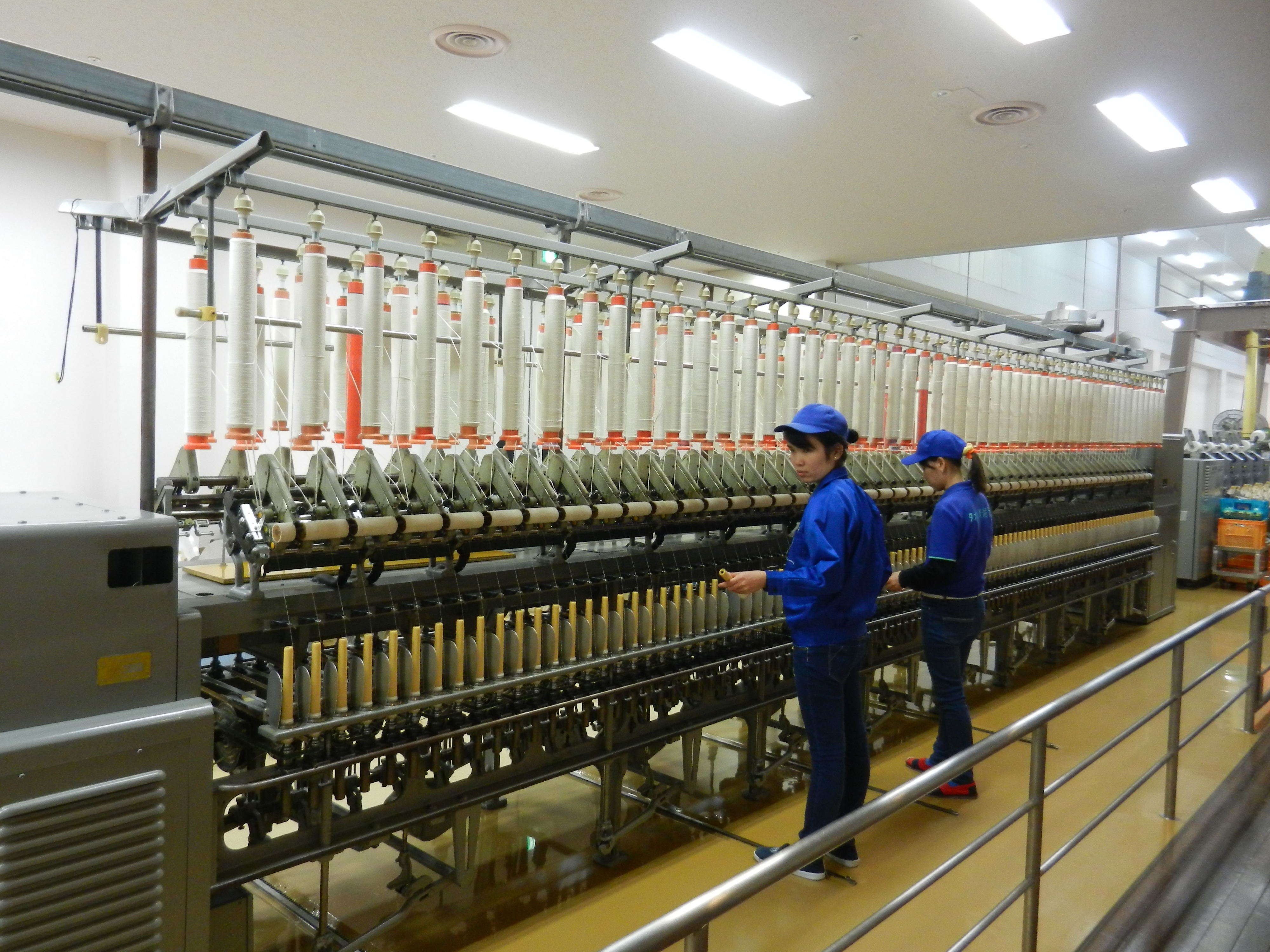 Spinning machine 精紡機